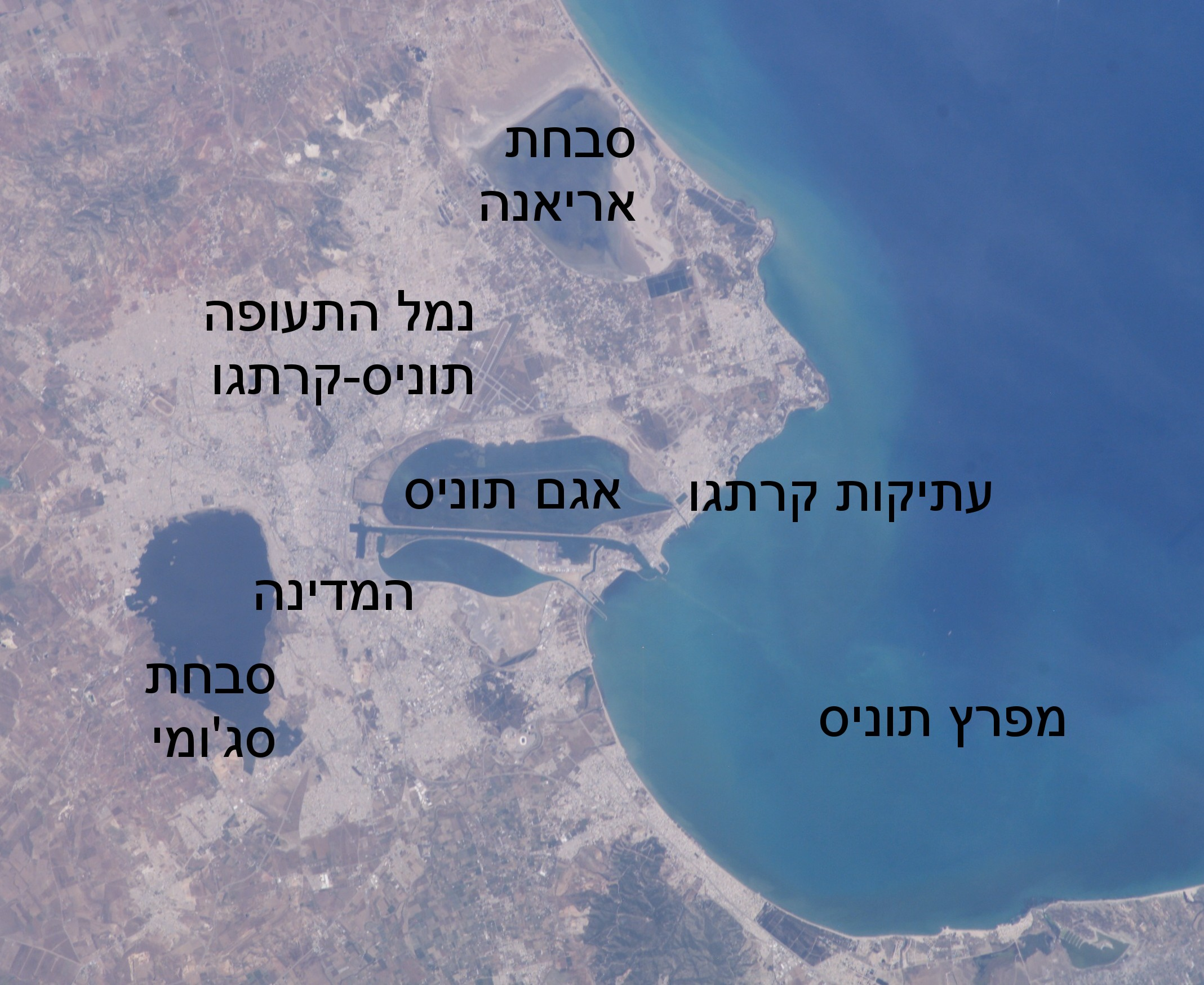 Tunus hava